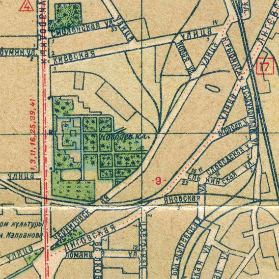 Место расположения Бадаевских складов на плане Ленинграда 1939 года. Пример бюрократического самообмана: широко известные складские помещения и разветвленные подъездные пути не указаны по соображениям секретности.